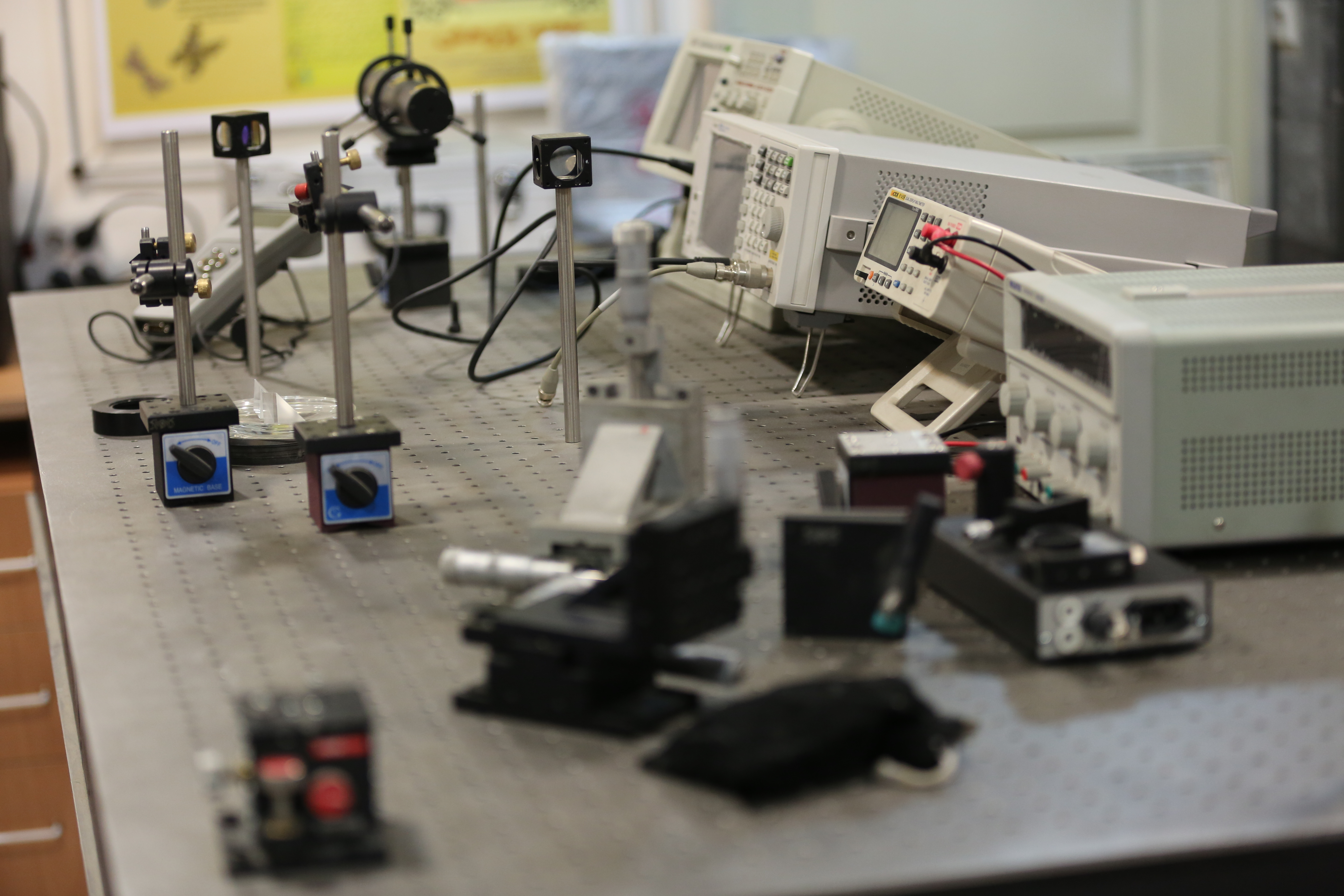 آزمایشگاه نانوفوتونيک و اپتوالکترونيک دانشگاه شهید رجایی